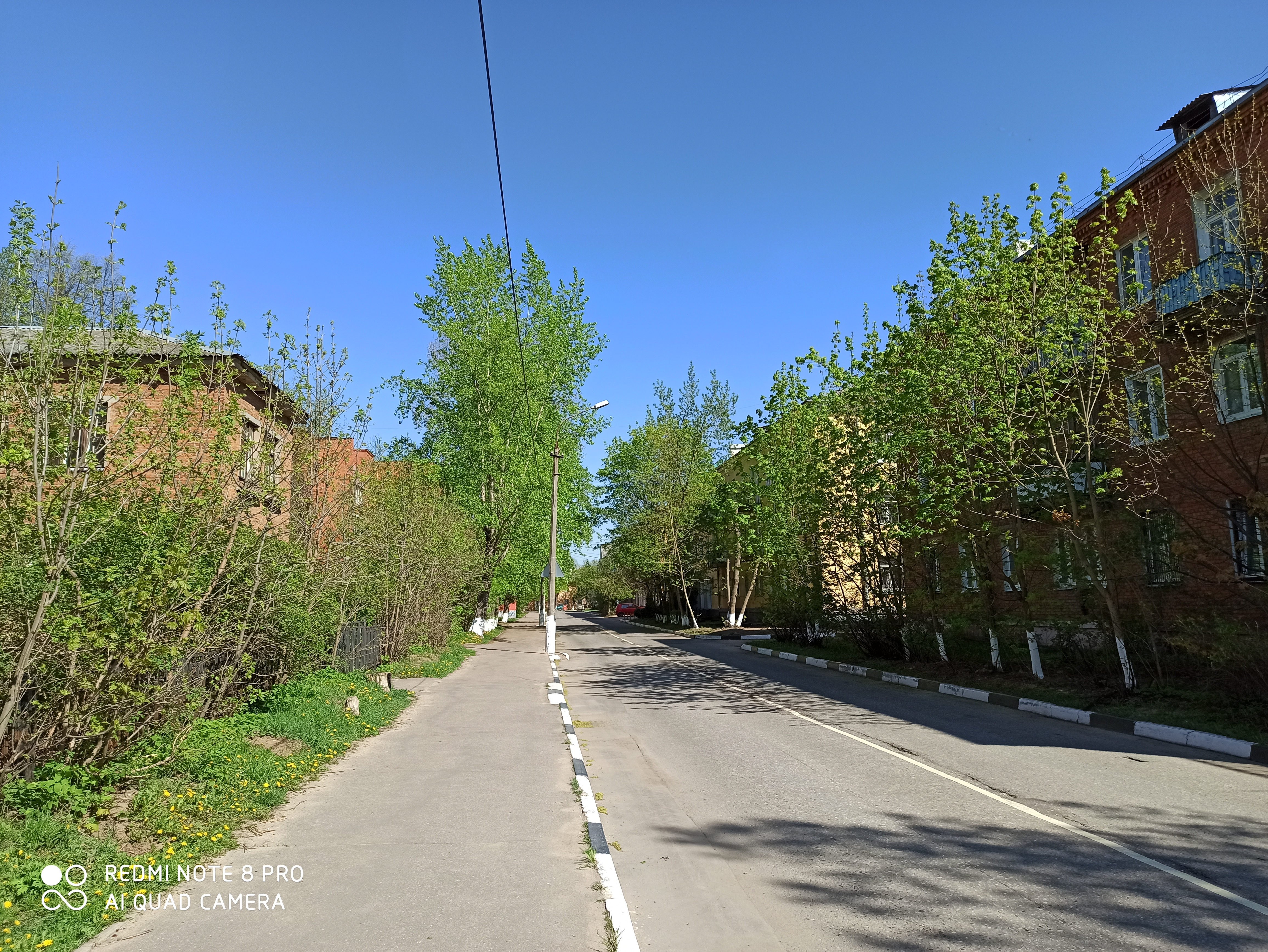 Спортивный проезд в районе бывшего здания музыкальной школы (слева), май 2020 года